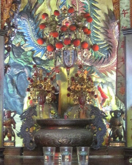 大灣國聖宮太媽